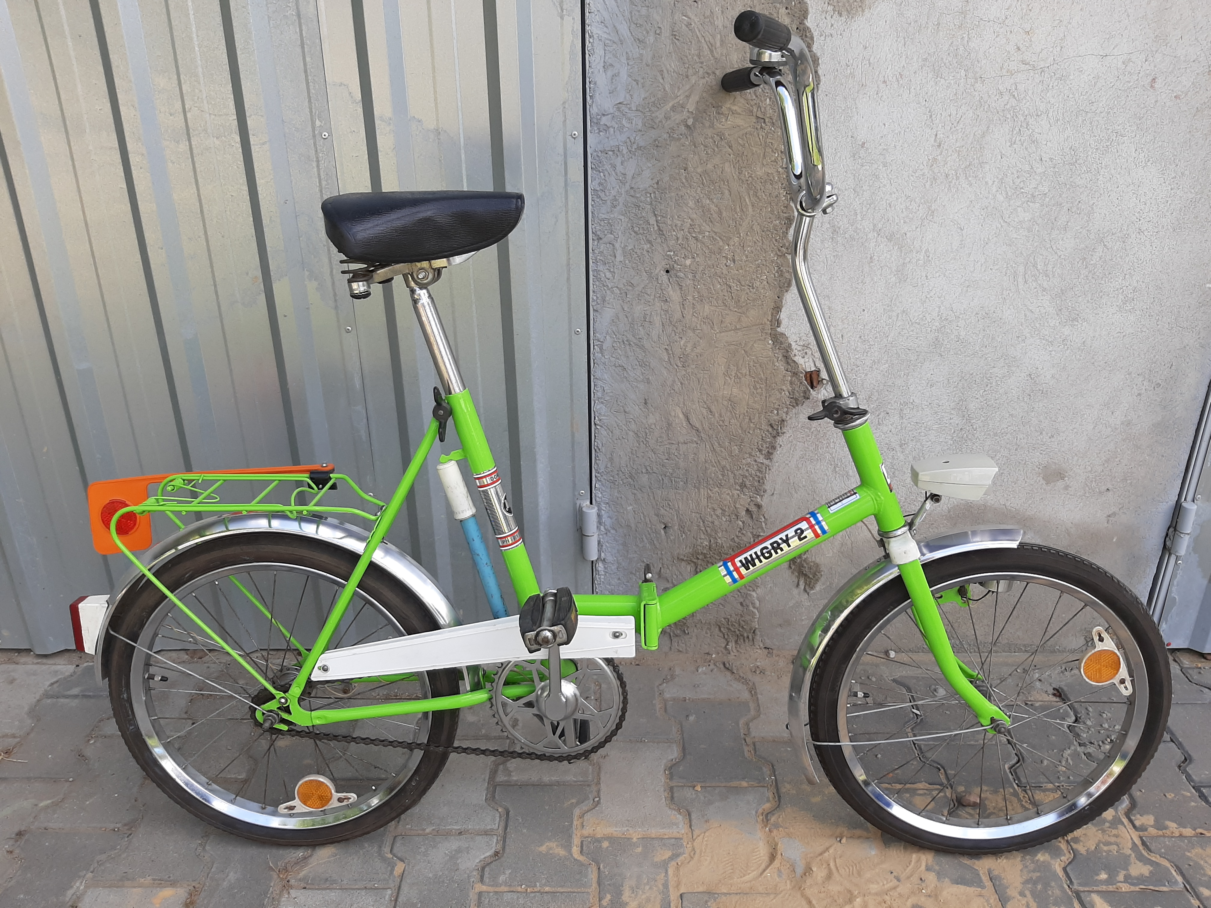 Romet Wigry 2 1978 z wyposażeniem dodatkowym odblaski i ramię bezpieczeństwa